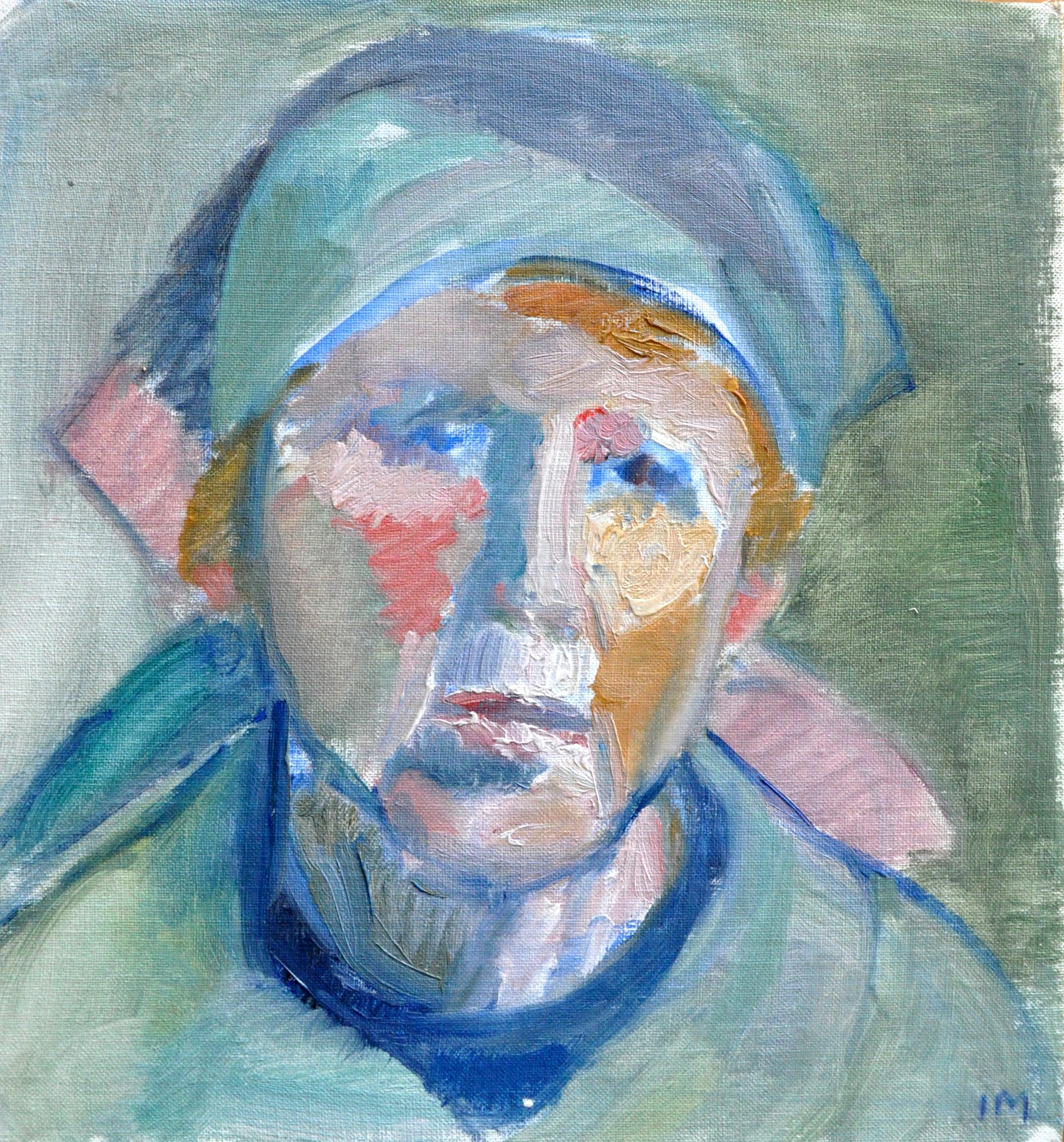 Målat självporträtt av Inger Manne, skapat 1977. Målningen avfotograferad av Fabian Wellving.